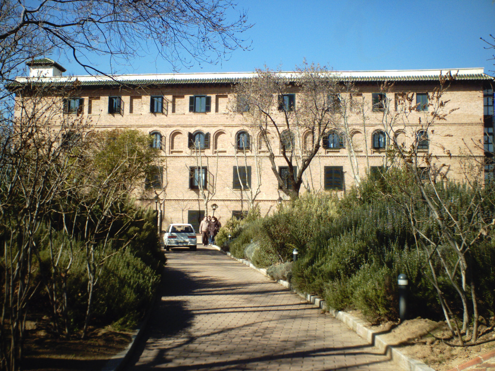 Primer edificio a la vista nada más entrar en el recinto de la Residencia de Estudiantes, en Madrid, España. Es uno de los tres pabellones destinados actualmente a la actividad de alojamiento.